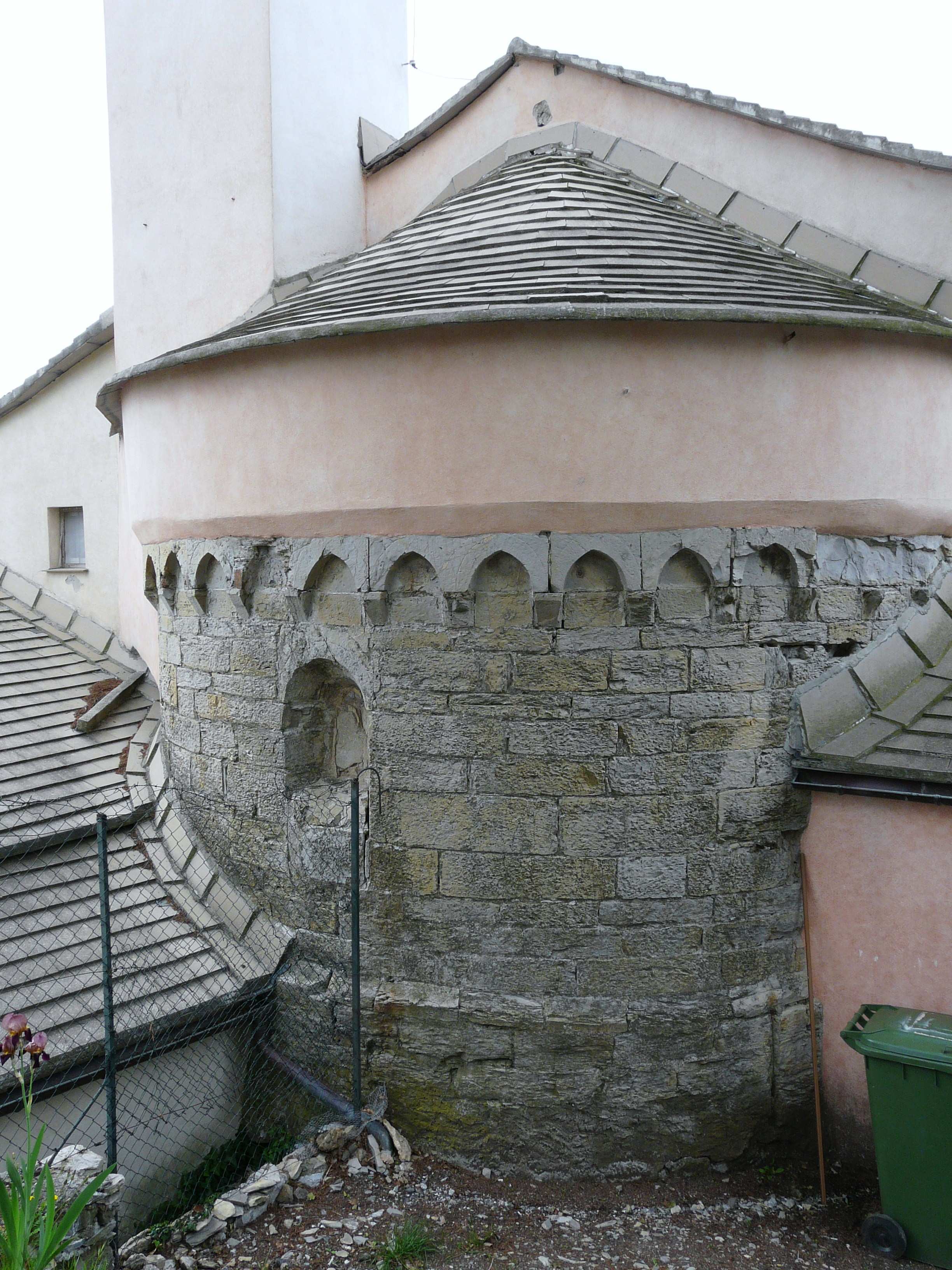 Abside esterno della chiesa di Sant'Apollinare, Sant'Apollinare, Sori, Liguria, Italia